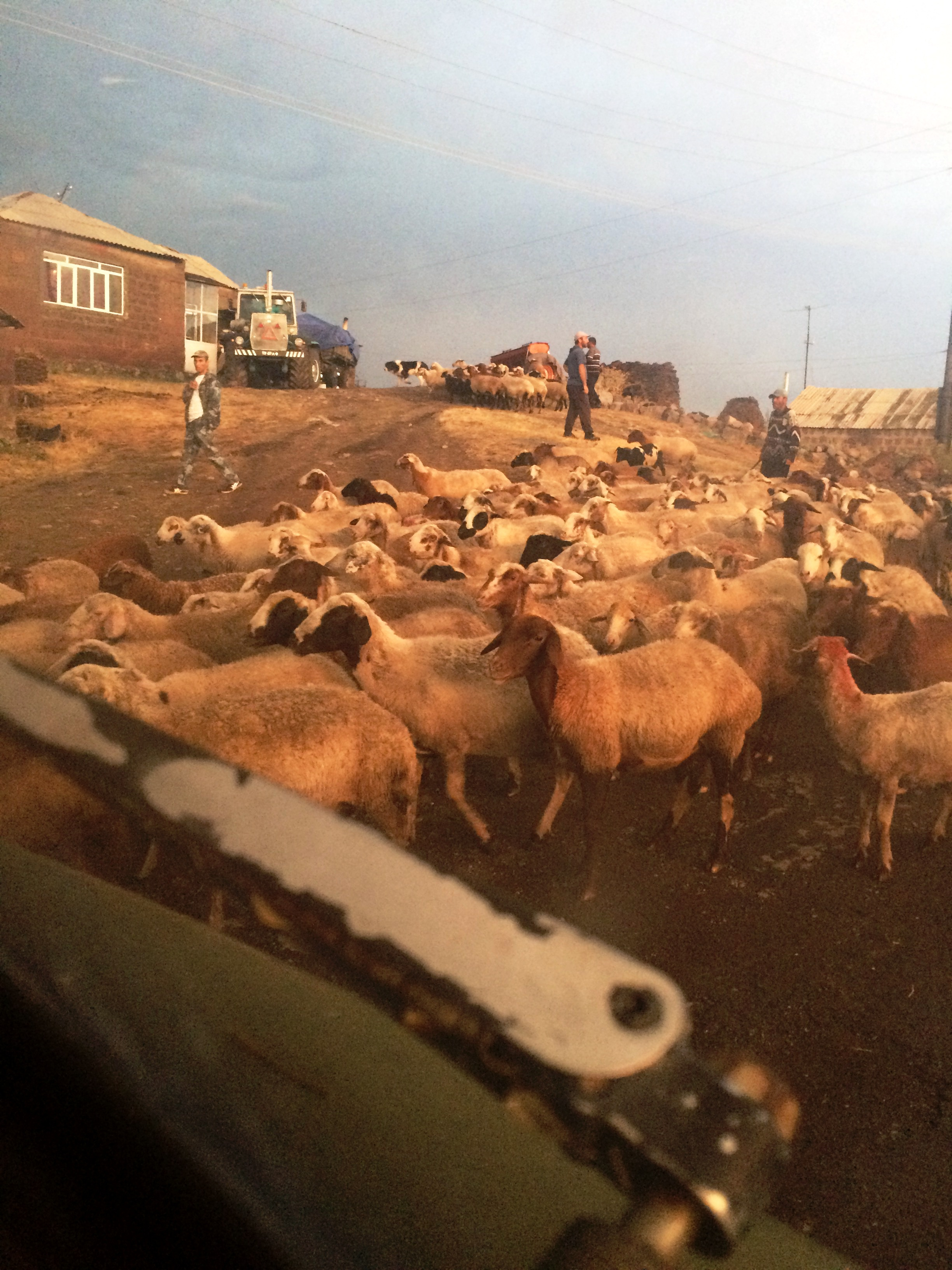 Ոչխարների քշում Քարաբերդ գյուղում